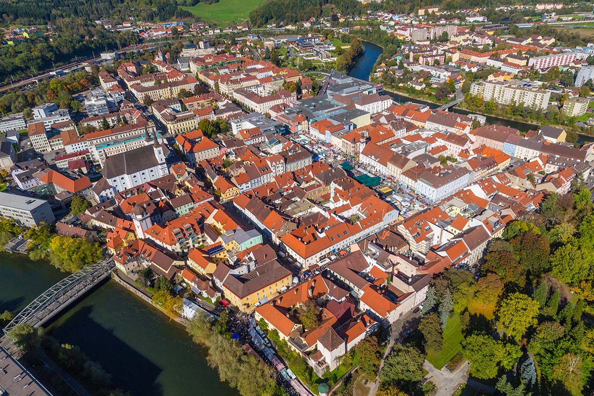 Leobener Innenstadt, in der Murschleife gelegen